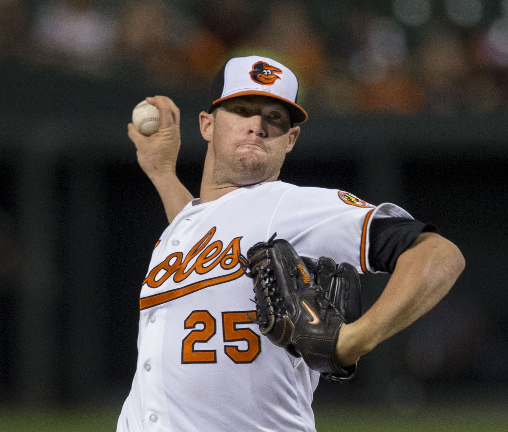 Bud Norris